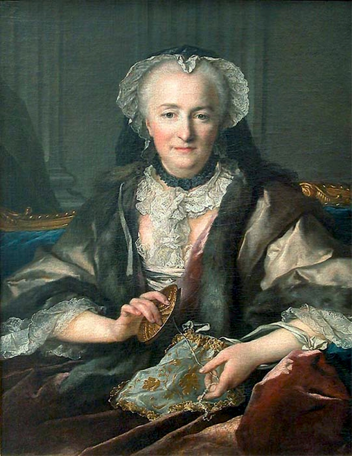 Луи Токке. Портрет мадам Данже. 1753. Париж, Лувр